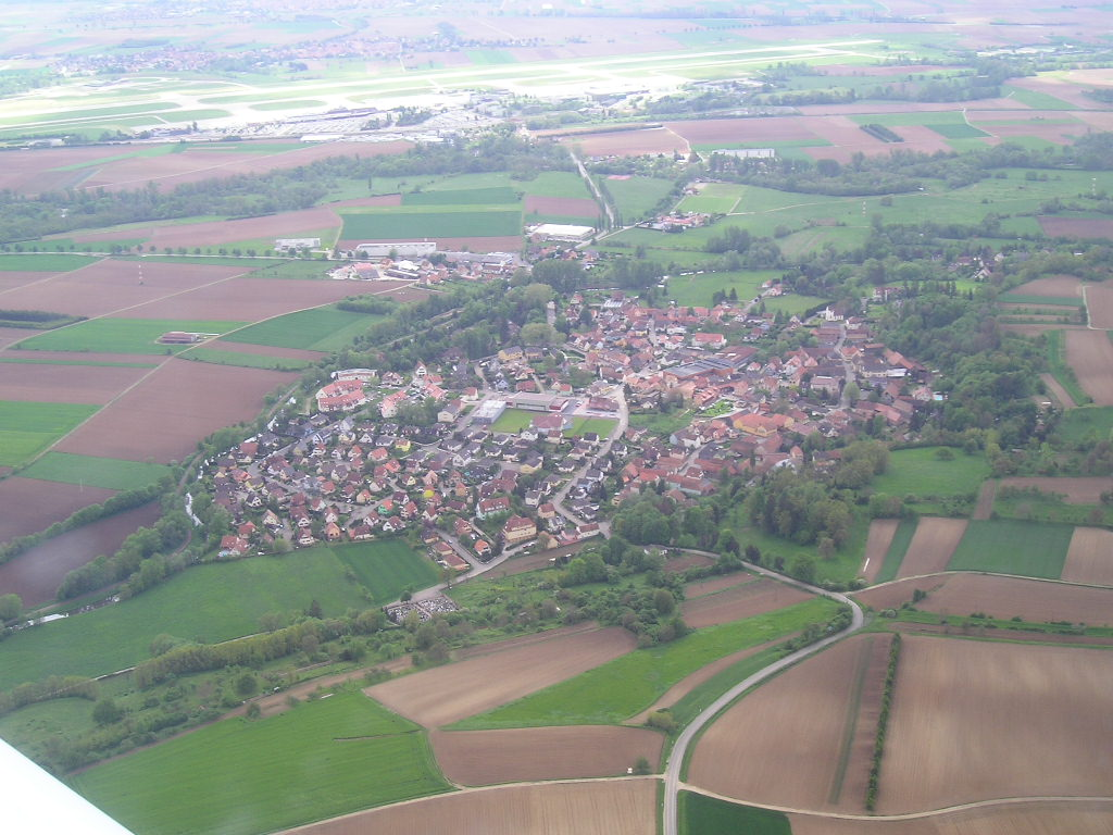 Photo aérienne de Hangenbieten